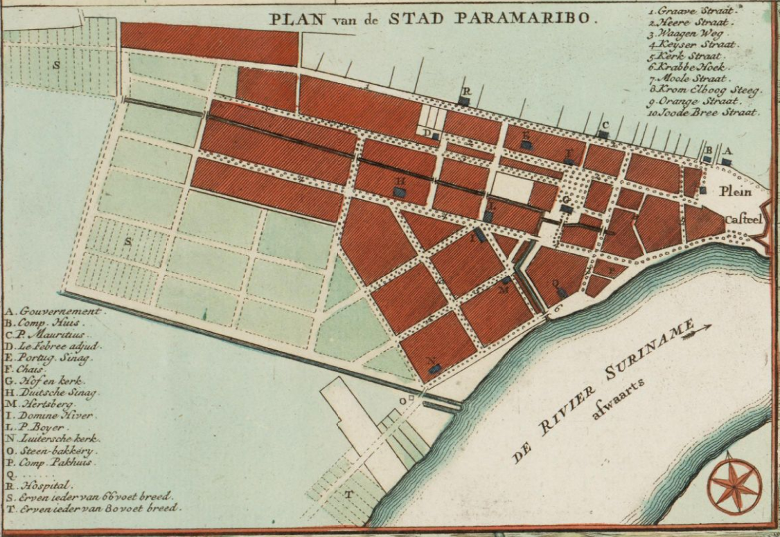 Fragment uit: Algemeene kaart van de Colonie of Provintie van Suriname (situatie 1737).